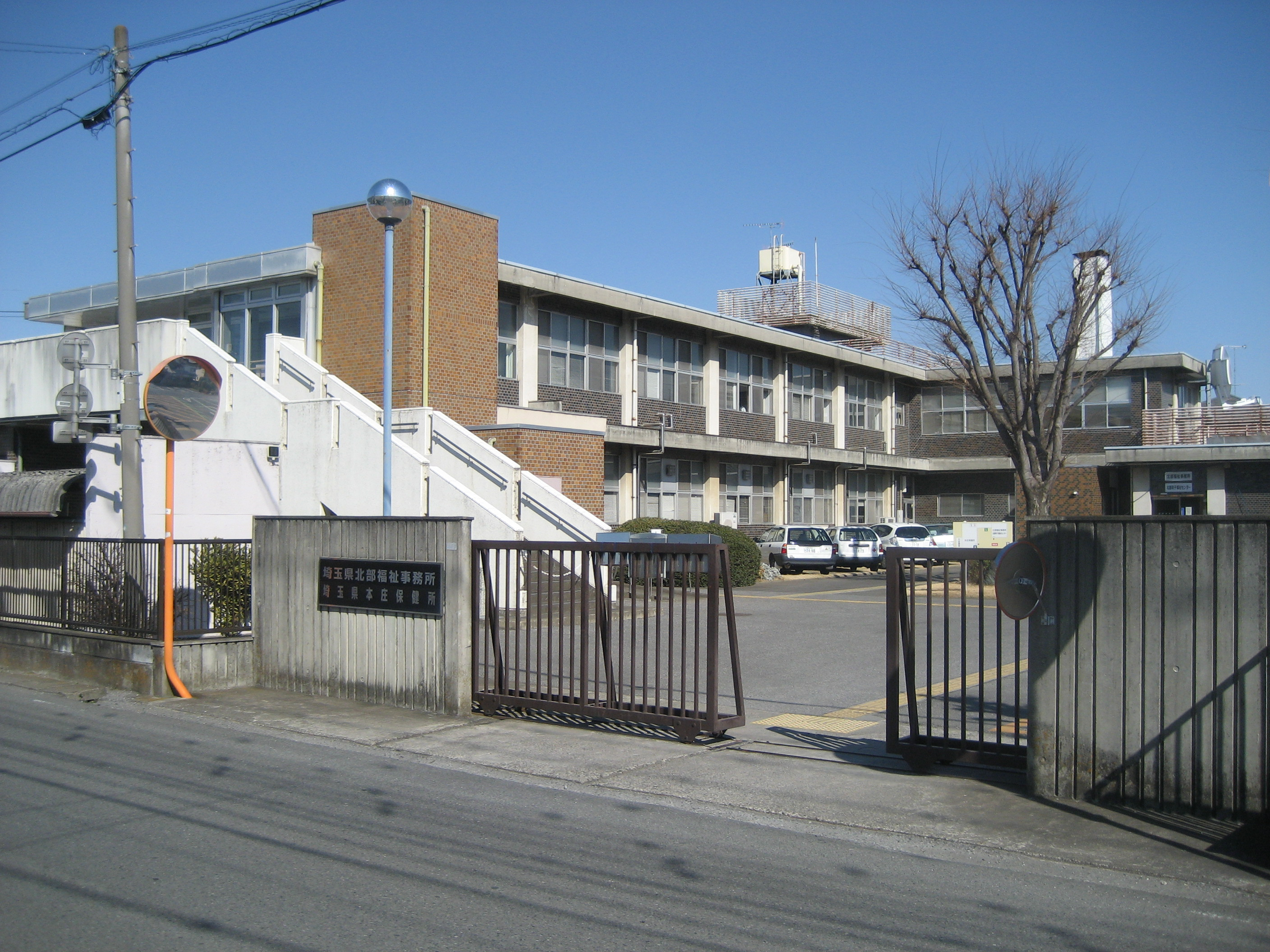 埼玉県本庄市にある埼玉県北部福祉事務所・本庄保健所庁舎